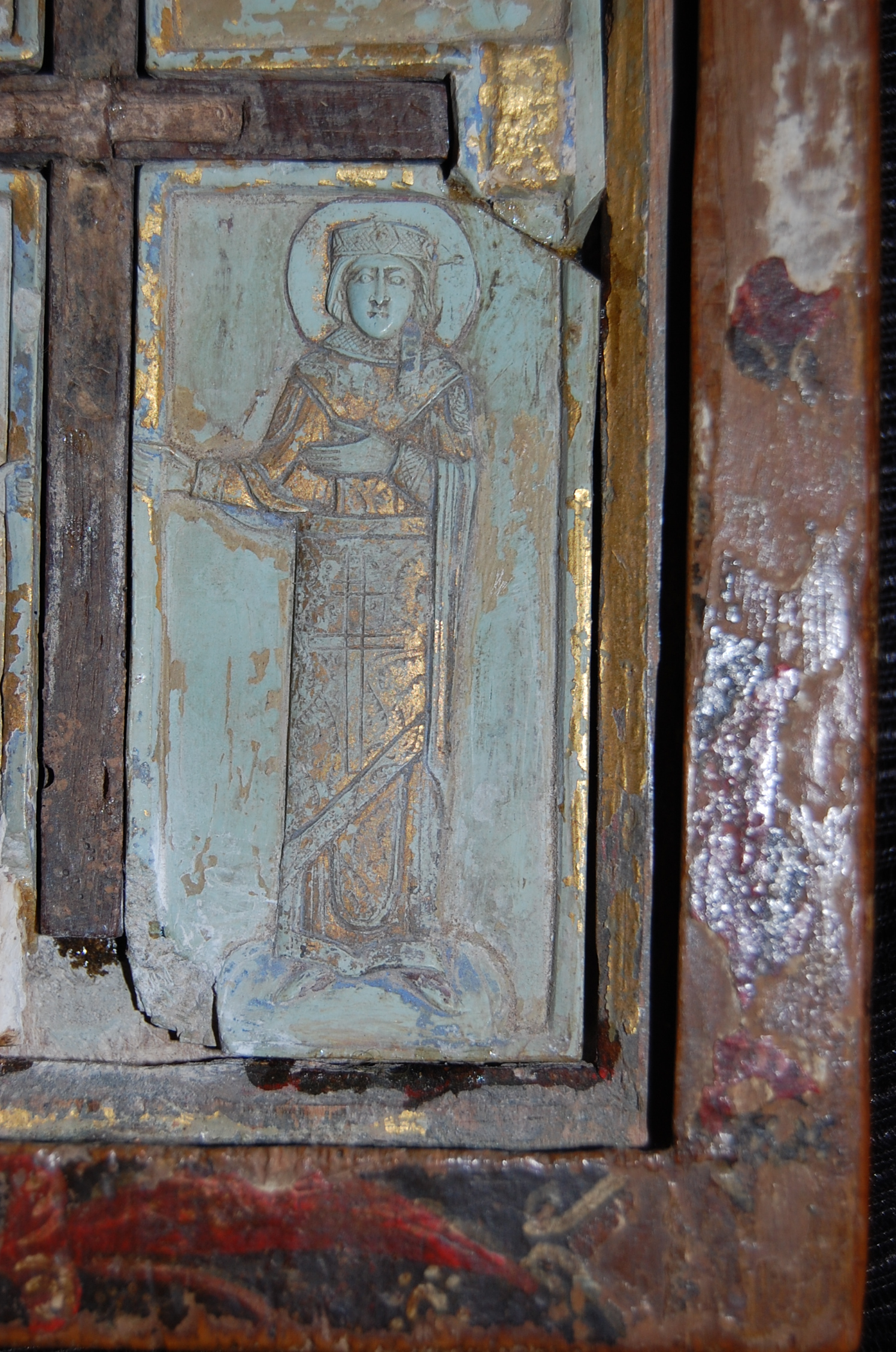 Raffigurazione di Sant'Elena, in atto di reggimento della Santa Croce, contenuta nella Stauroteca patrimonio della "Chiesa Santa Maria la Cava e Sant'Alfio" (Lentini)